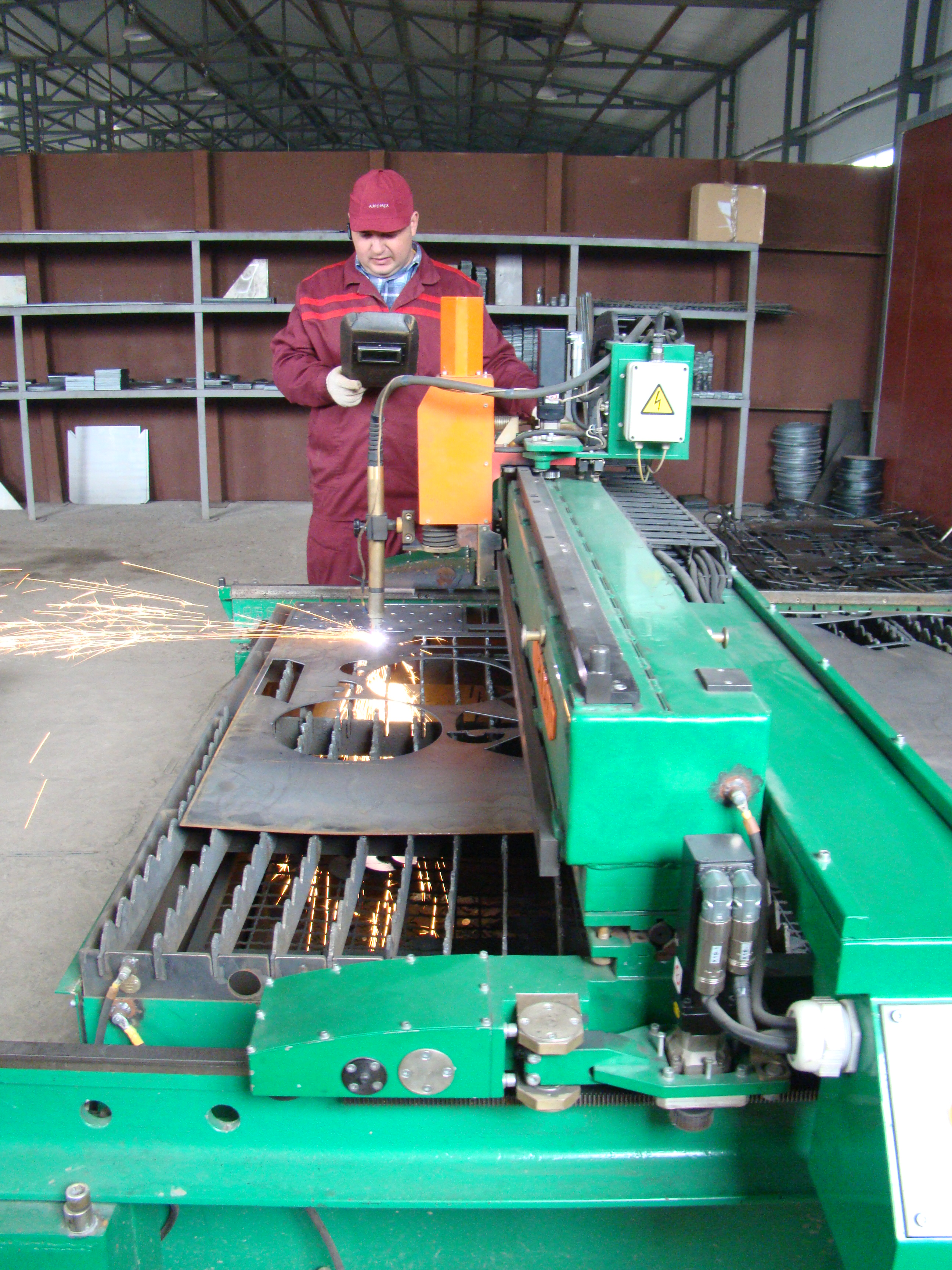 Плазморіжучий станок на луганському підприємстві Аеромех